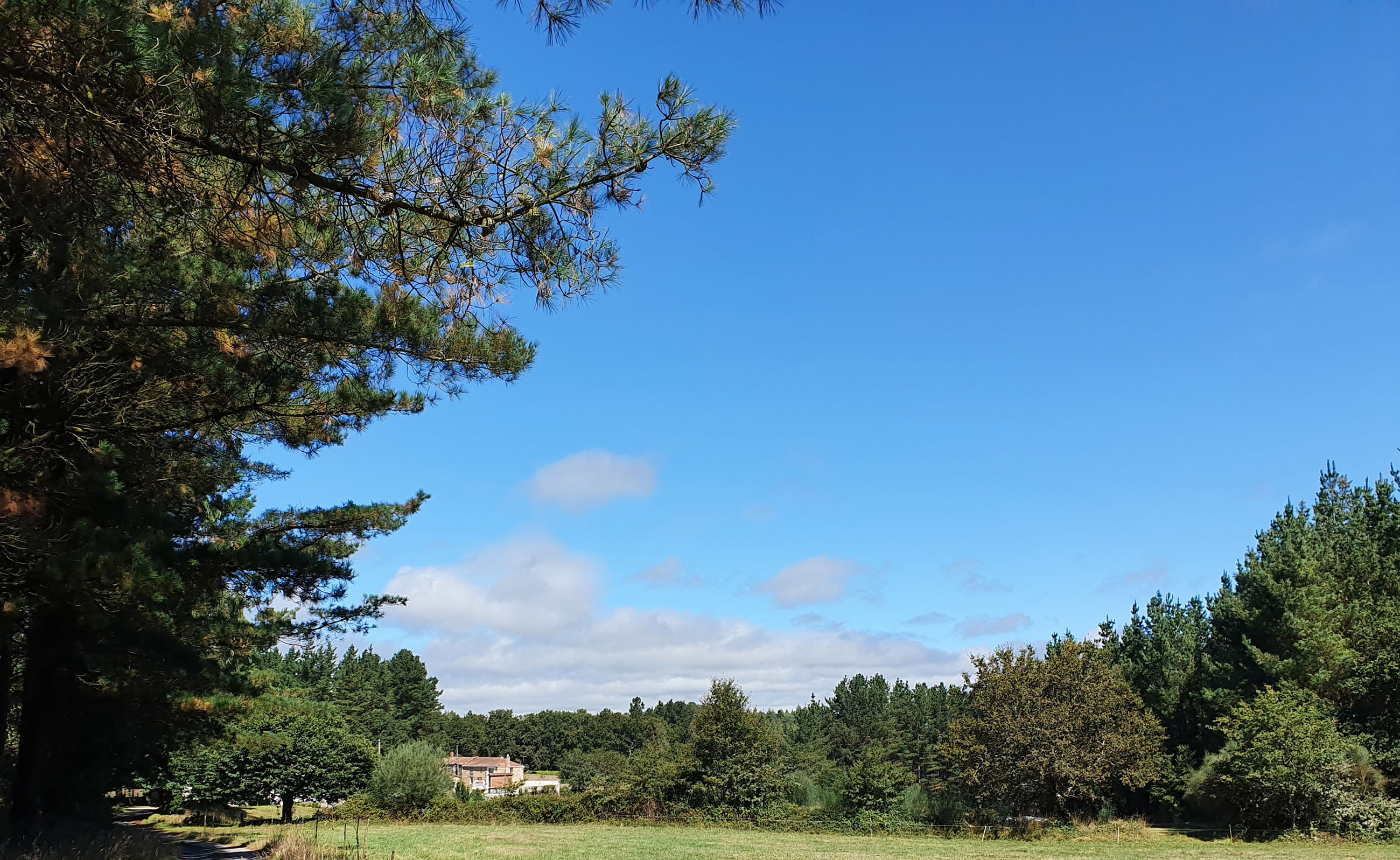 Lugar das Casas Novas, na parroquia monterrosina de Ligonde.